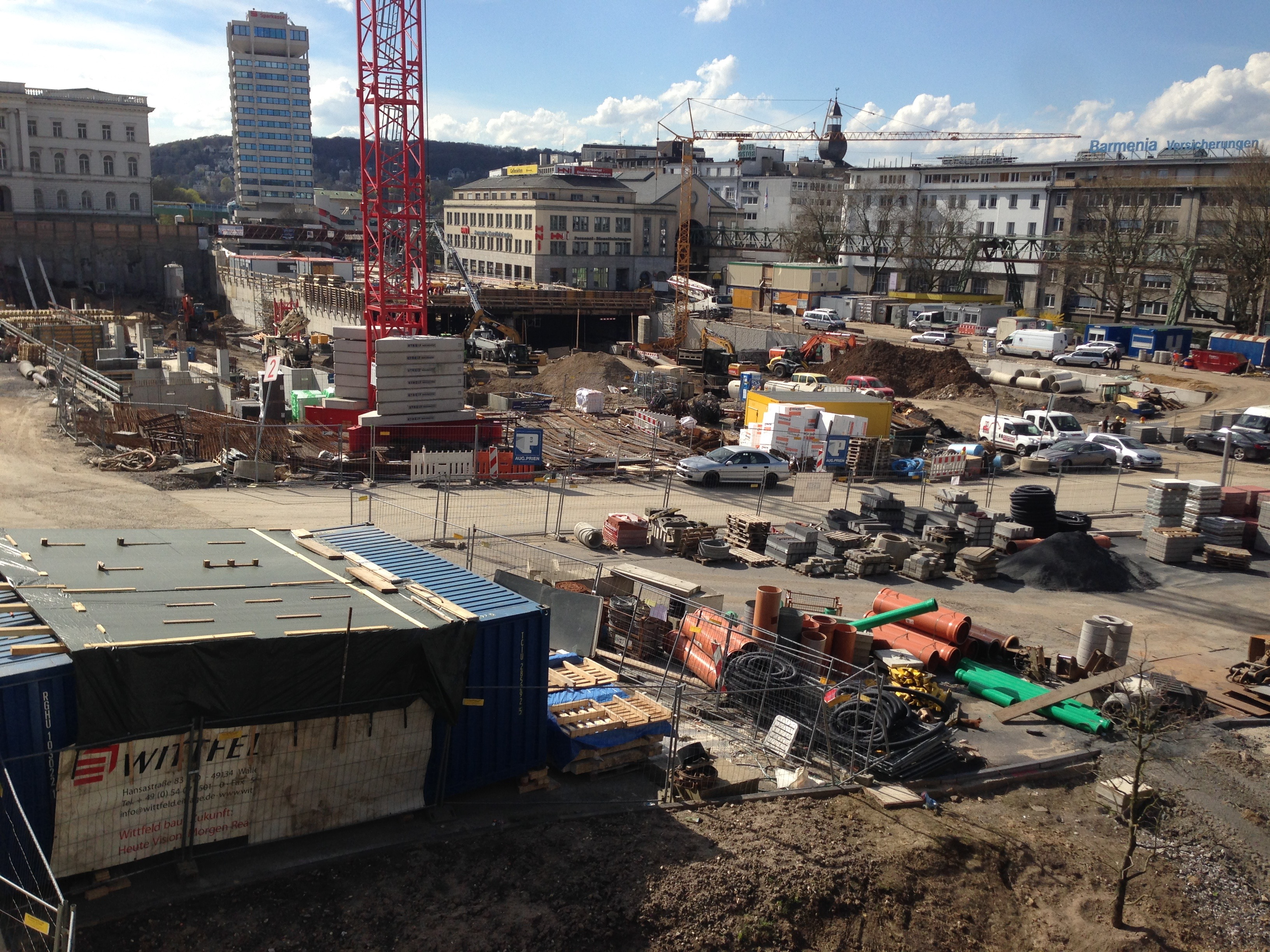 Baustelle des Döppersberg-Umbaus in Wuppertal im April 2016. Errichtung des Parkhauses, der Geschäftsbrücke und Tieferlegung der B7.